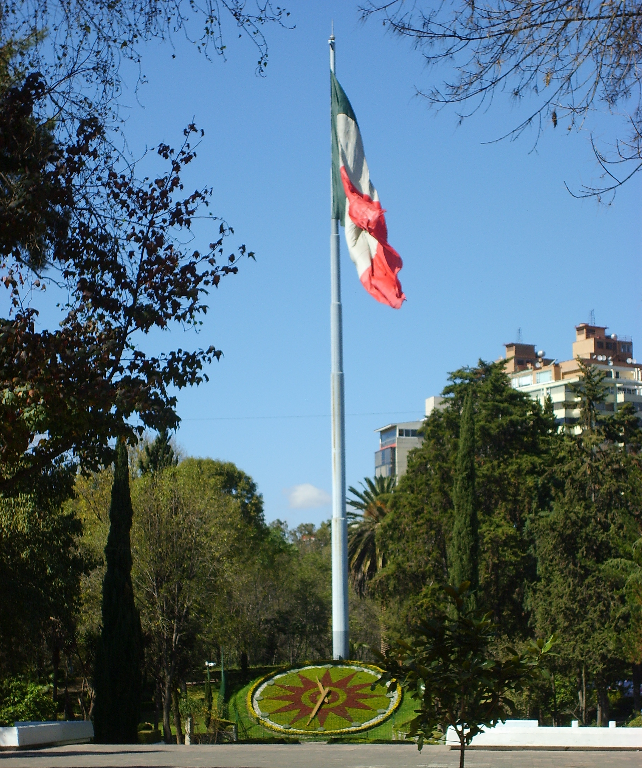 El reloj del Parque Luis G. Urbina (Parque Hundido) del la Ciudad de México